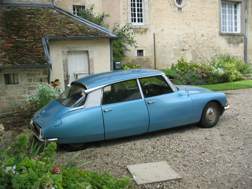 Citroën DS